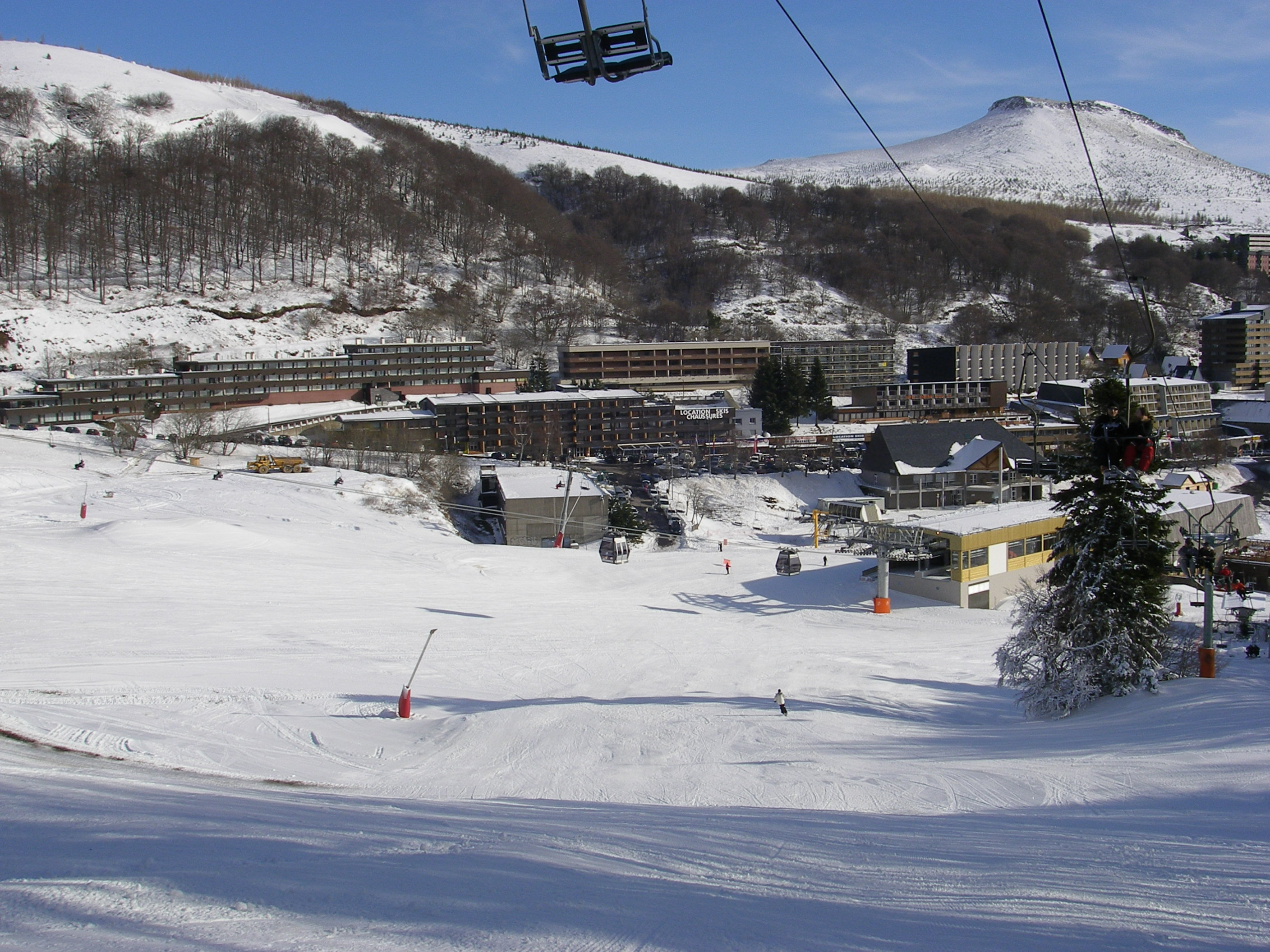 gare de départ du funitel de Super Besse